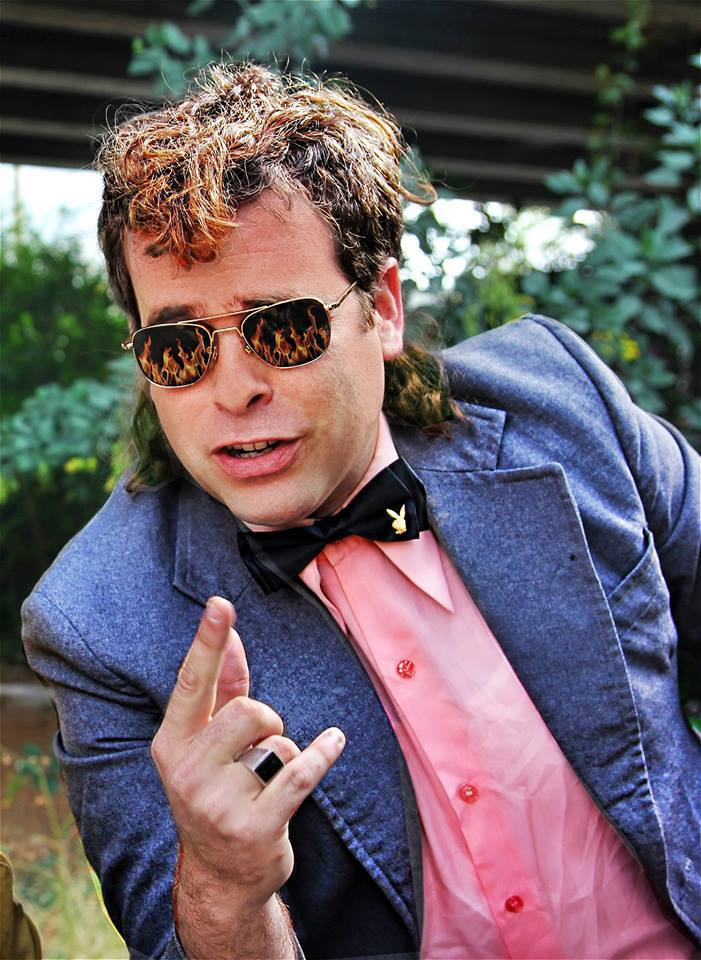 משיח קלאסי